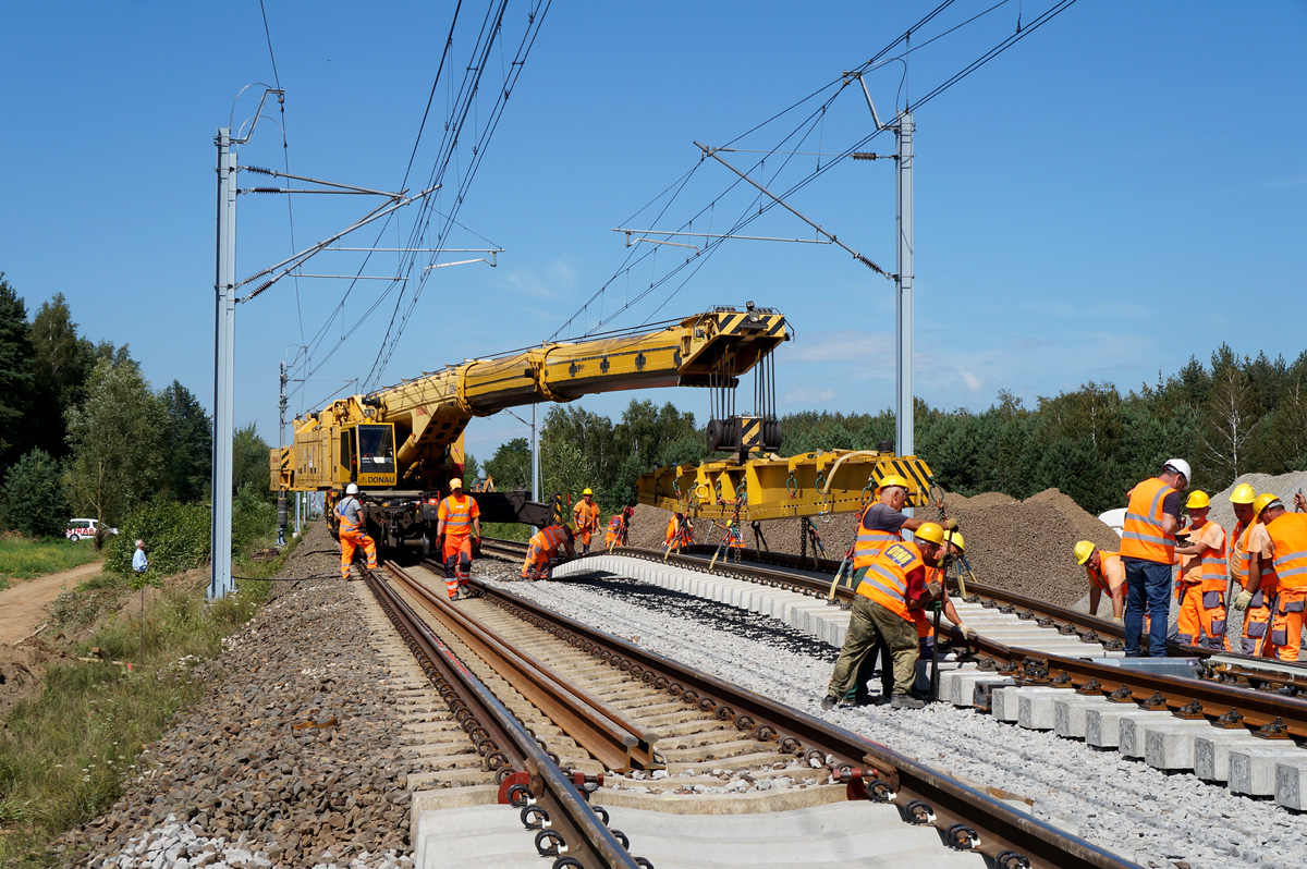 Modernizacja posterunku Biała Rawska